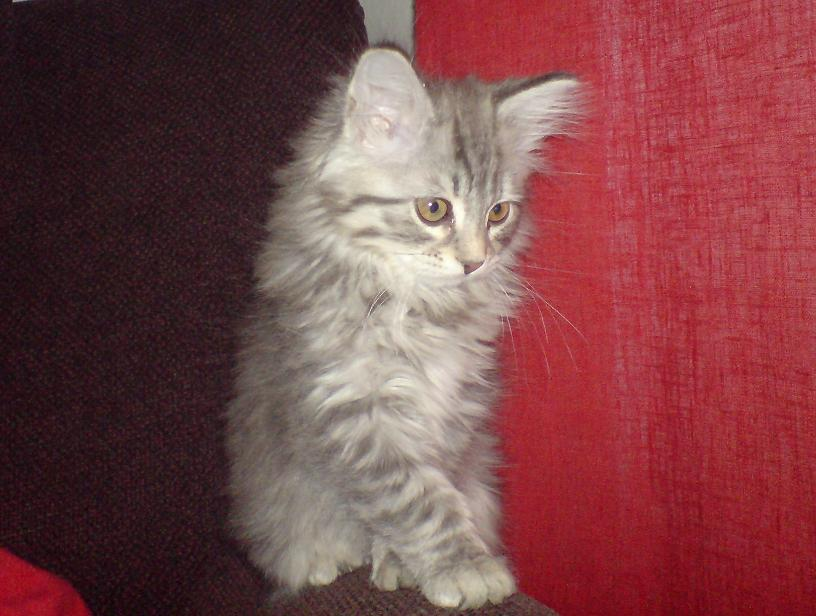 Sibirisk kattunge 12 veckor gammal